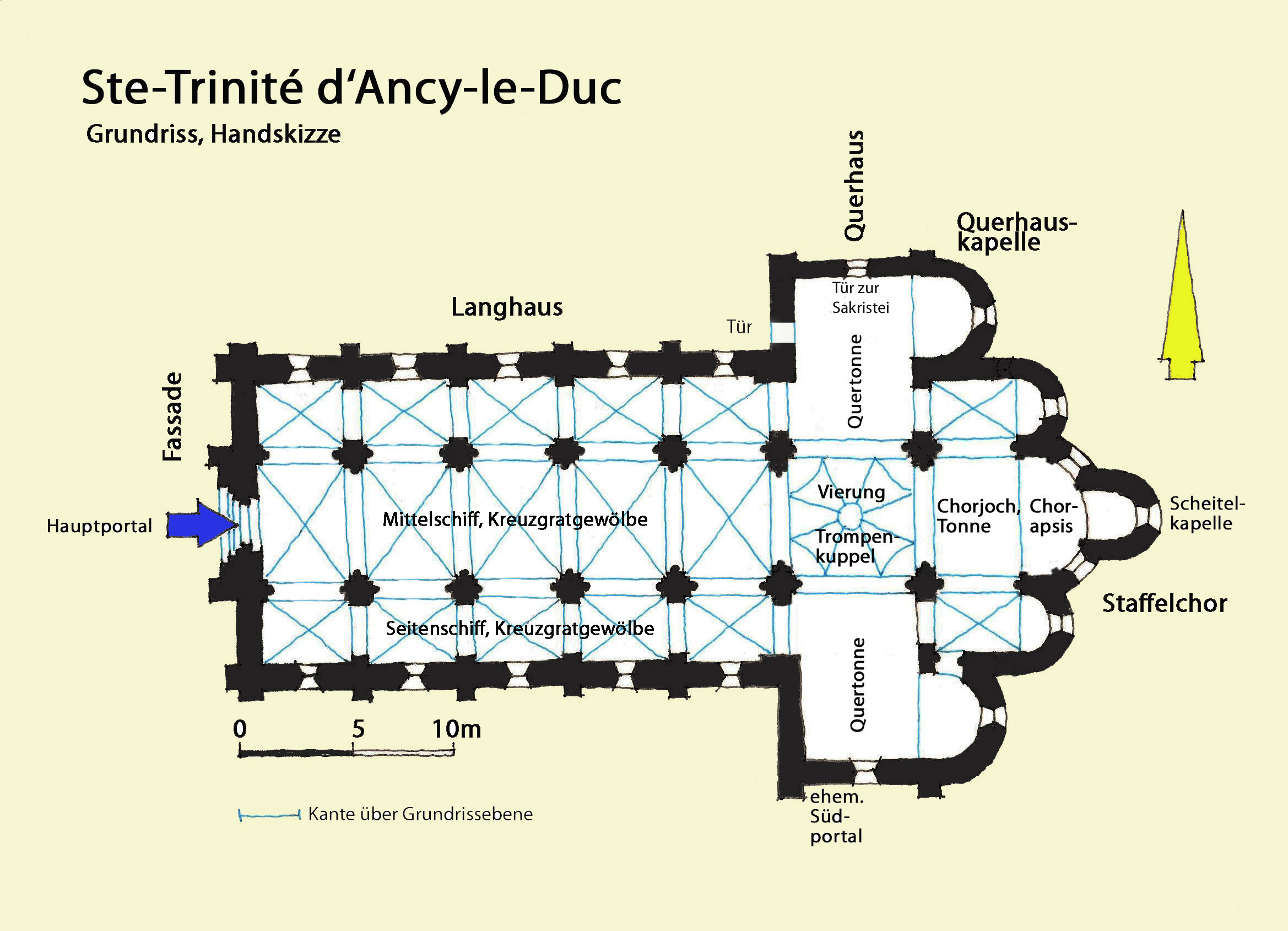 Ancy-le-Duc, Grundriss, Handskizze